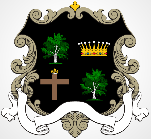 Los árboles representan a los encinares típicos de aquí. La corona representa como, aun sin ser de la realeza, este pueblo es muy noble. La cruz representa a Dios nuestro señor y a Cristo